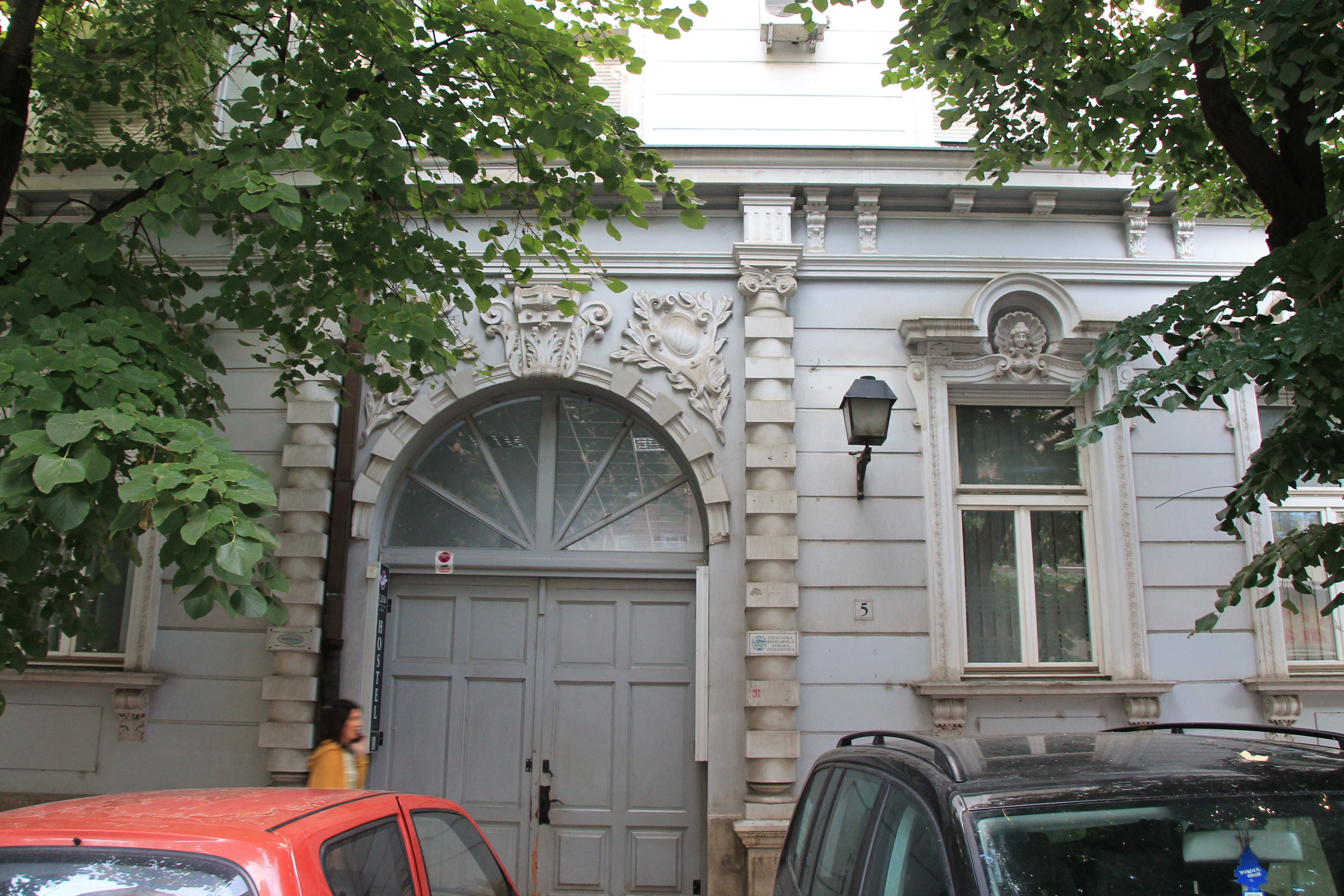 Trg Marije Trandafil